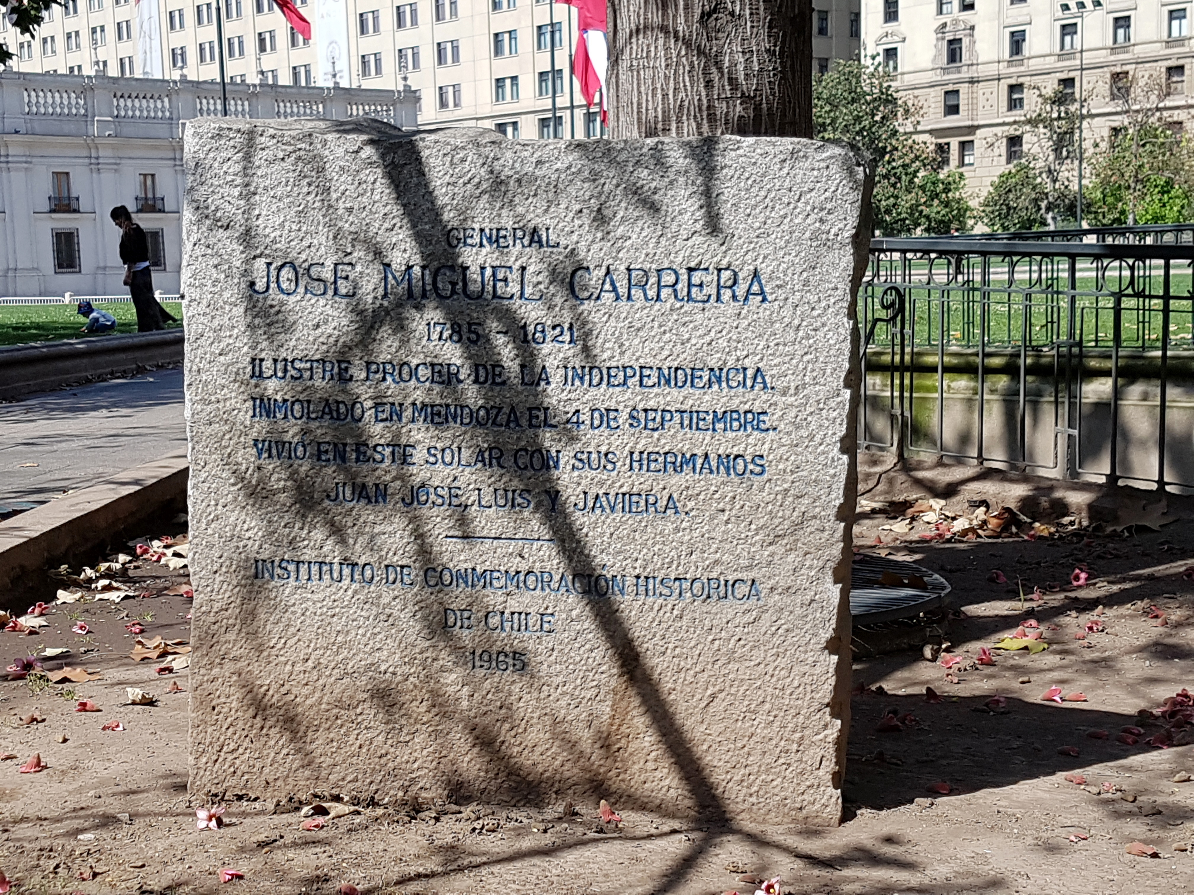 Piedra conmemorativa del solar donde vivieron los hermanos Carrera, esquina nororiente (calle Morandé con Agustinas) de plaza de la Constitución, Santiago de Chile.